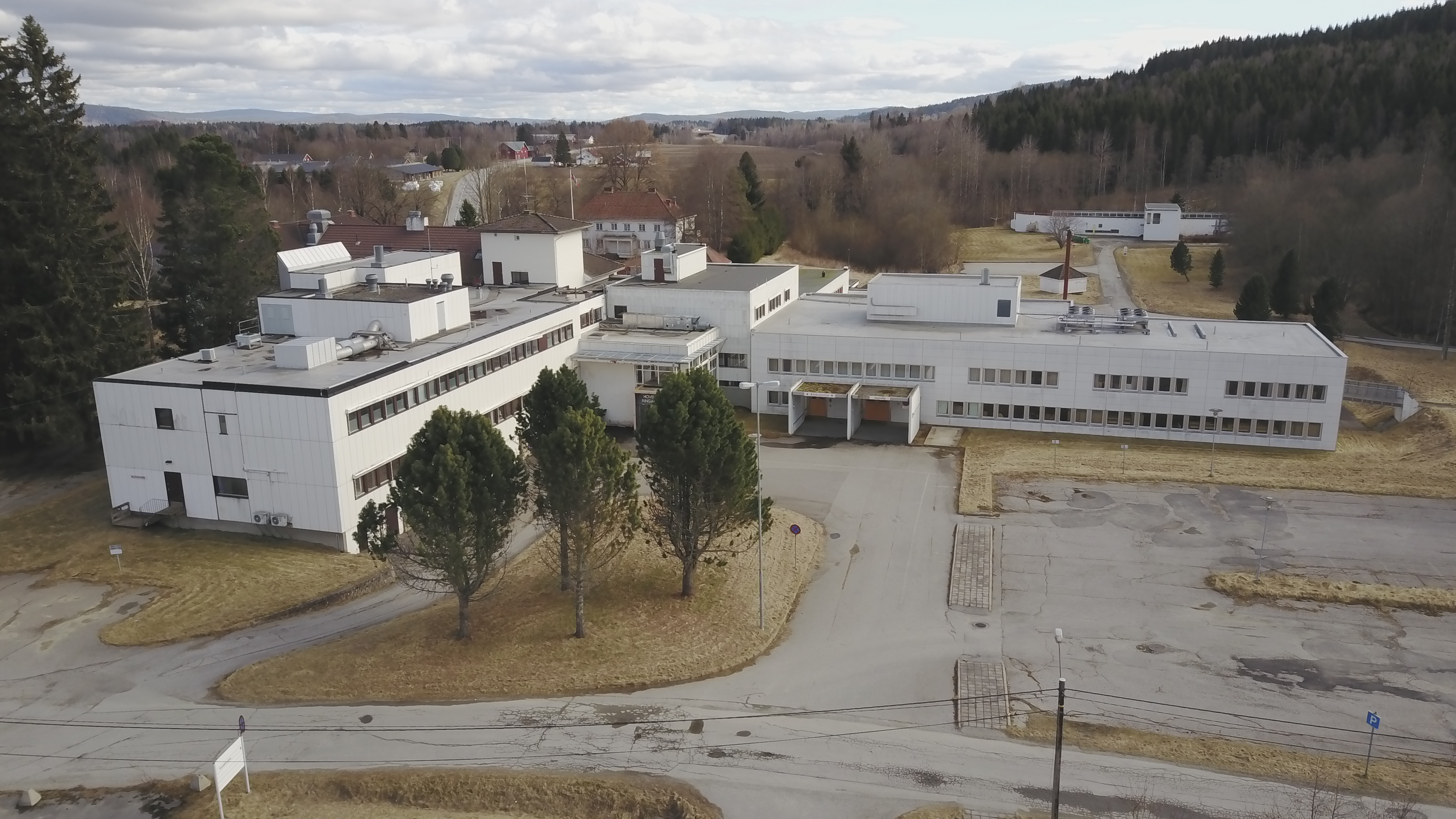 Nedlagte Stensby sykehus på Minnesund